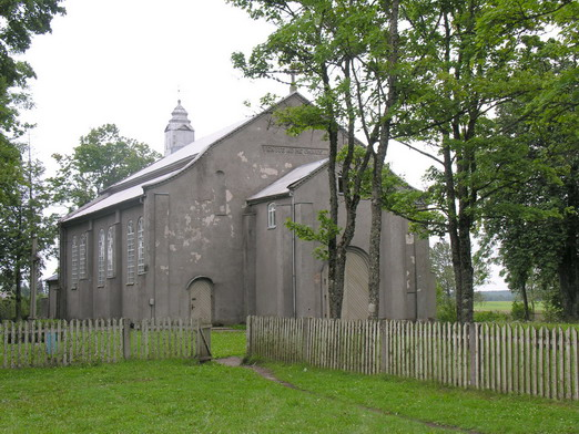 Renavo bažnyčia Foto: Algirdas, 2005 m. rugpjūčio 14 d.